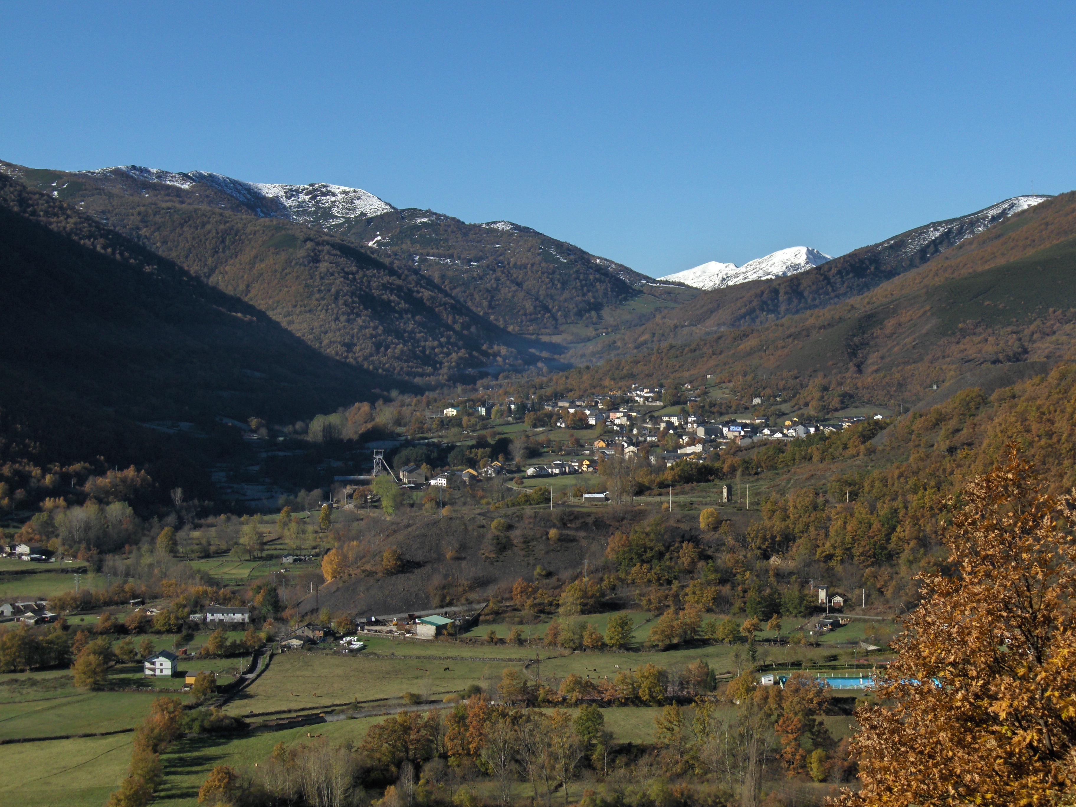 Valle de Laciana. Al fondo, Caboalles de Abajo.